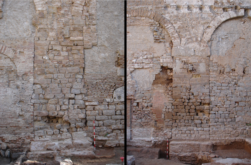 Vista de dos dels pilars de l'aqueducte romà, a la intervenció a la plaça del Vuit de Març de Barcelona